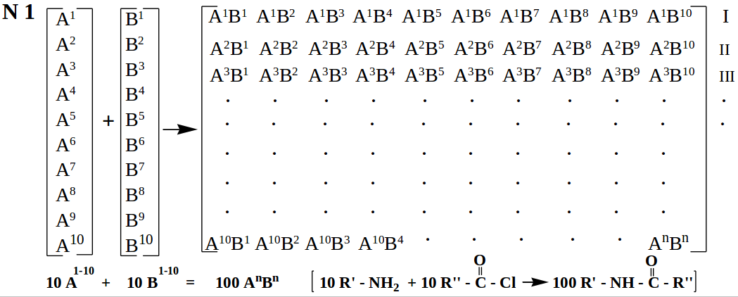 Կոմբինատորային օրգանական սինթեզ